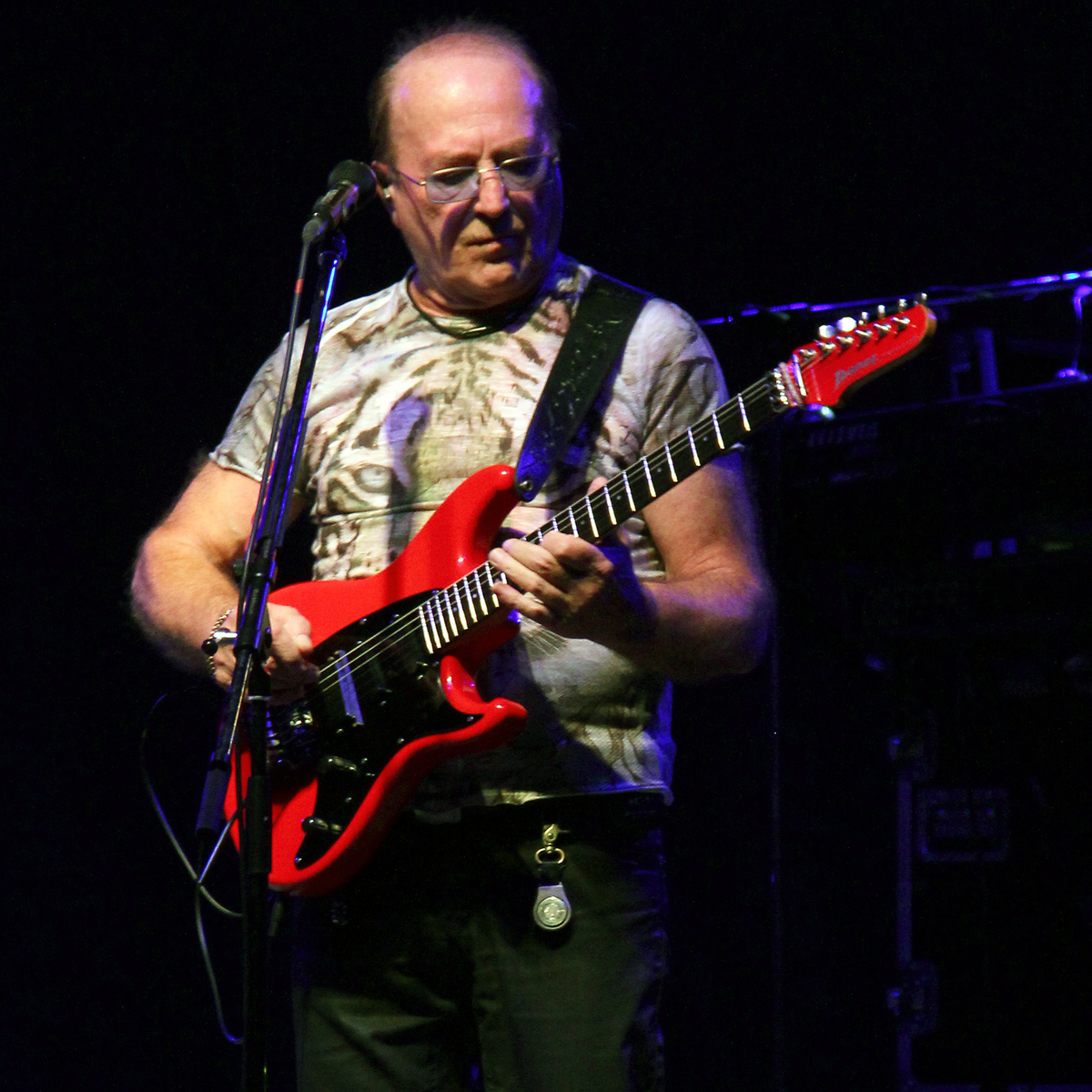 Petr Janda v Nových Zámkoch (august, 2014)